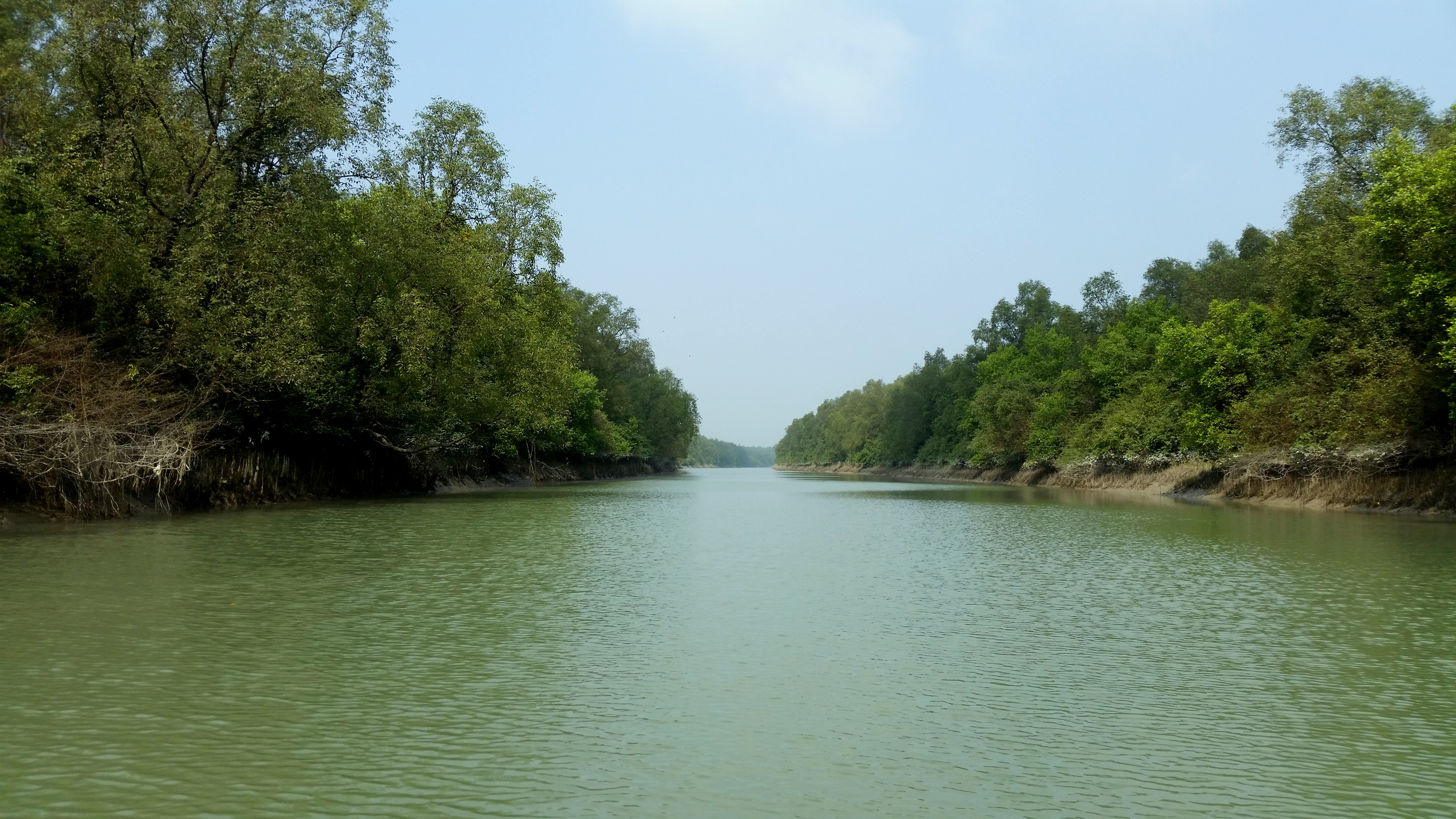 চর কুকরি-মুকরি বন্যপ্রাণী অভয়ারণ্য